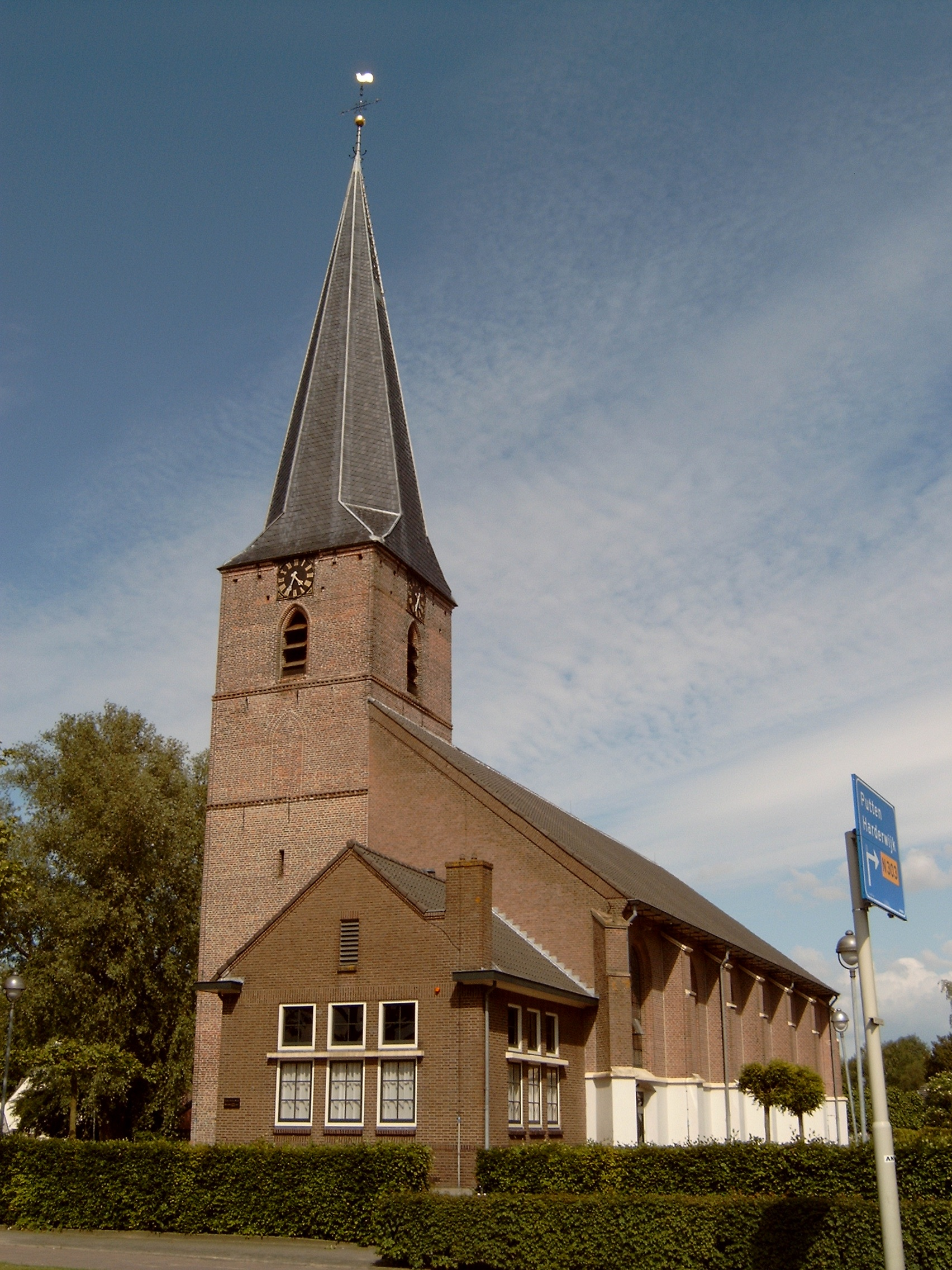 Voorthuizen, kerk